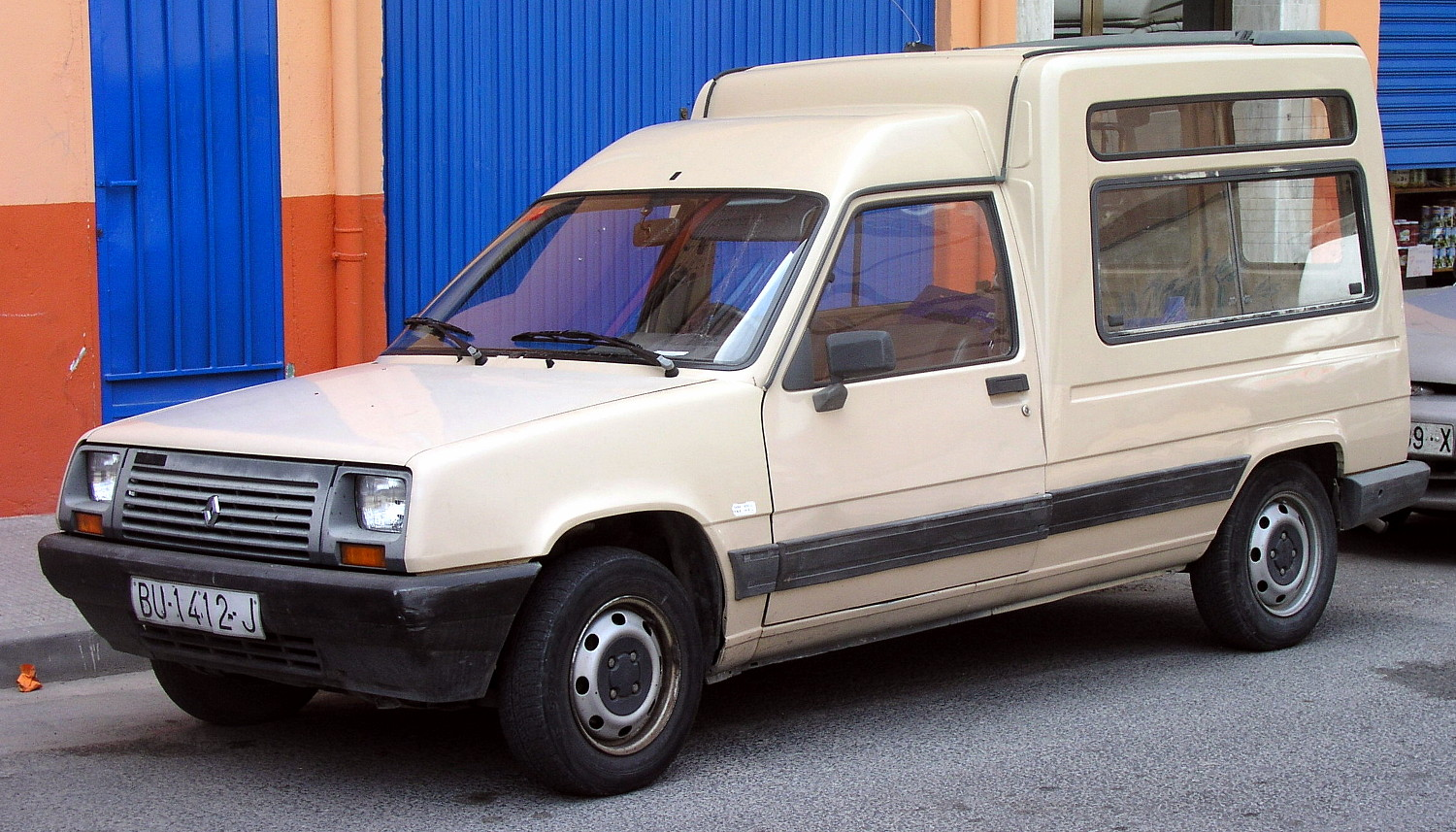 Renault Express de primera serie en España.